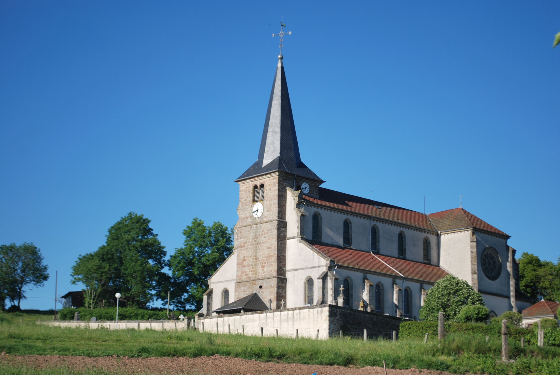 Façadeoccidentale et flanc sud de l'église de la Nativité-de-Notre-Dame de Grandvillers (88).